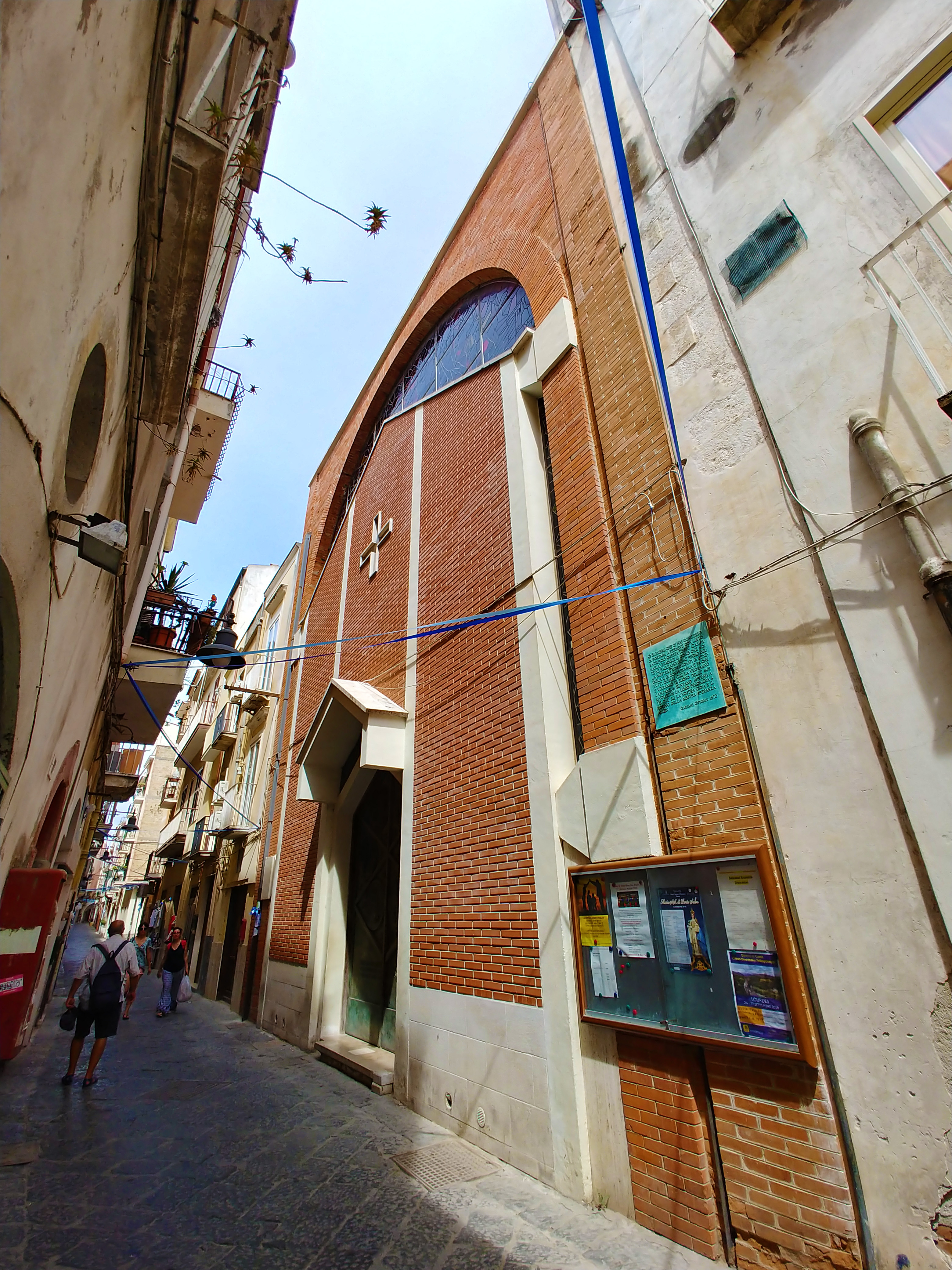 La facciata.